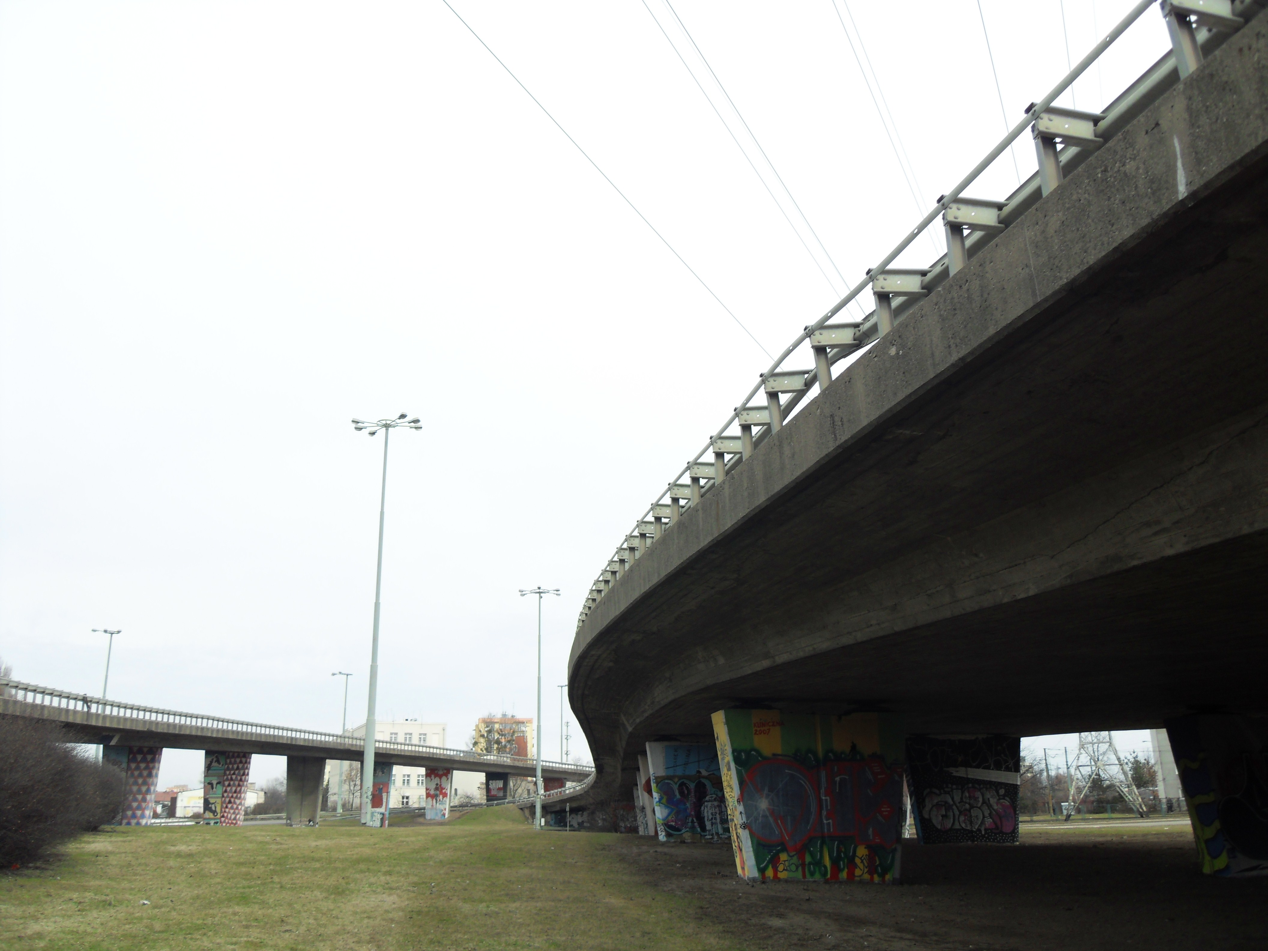 Gdańsk, Węzeł Kliniczna.